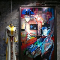 Au fil de l'Art (Toronto)